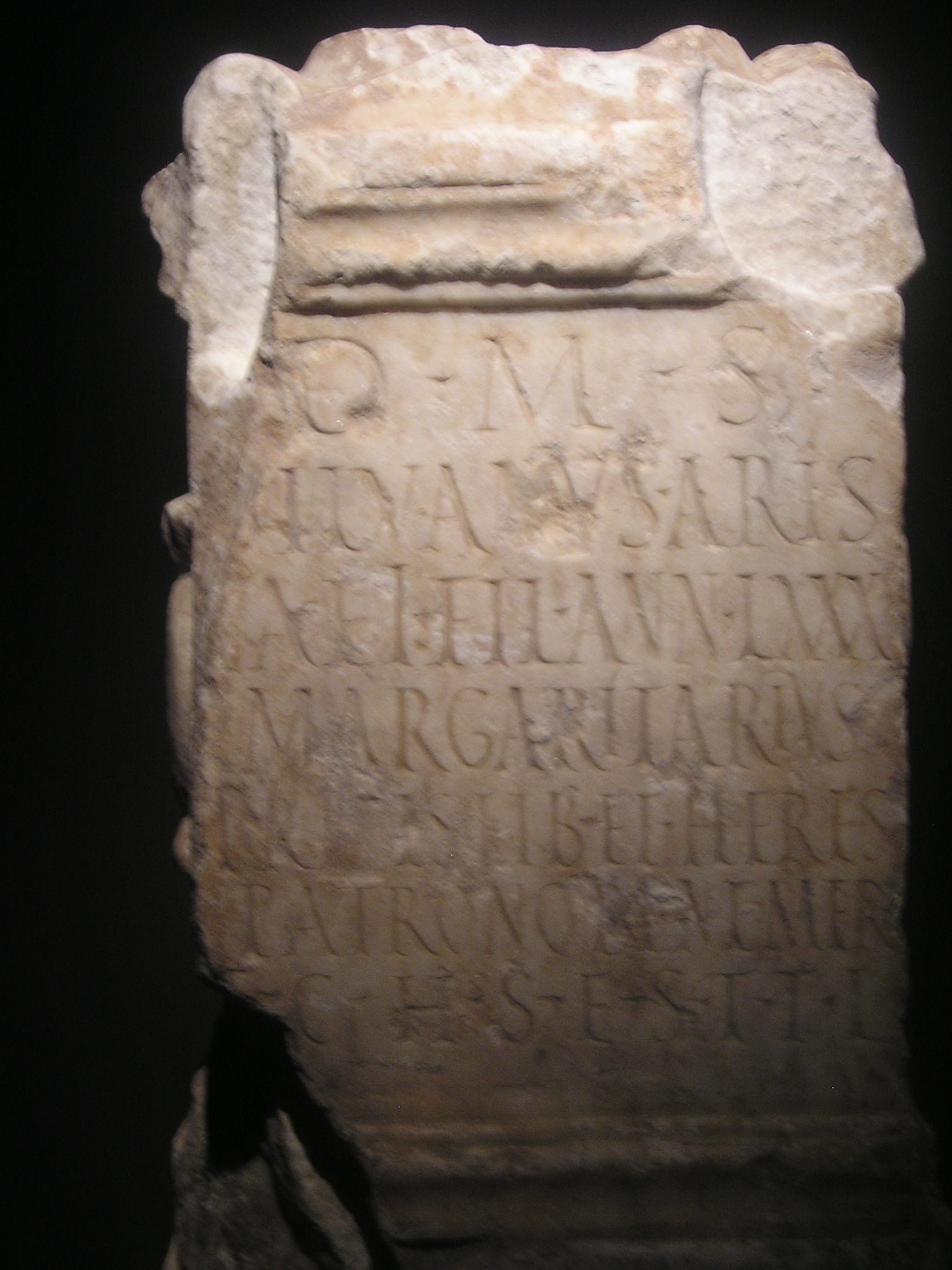 Inscripción funeraria romana conservada en el Museo Arqueológico Nacional de Madrid (España) procedente de Mérida (Badajoz, españa) correspondiente con CIL II 496 = EE VIII- 2, p 362 = ERAEmerita 369 = HEp. "2, 35: D(is) M(anibus) s(acrum) / Silvanus Aris/taei fil(ius) an(norum) LXXX / margaritarius / Prepis lib(erta) et heres / patrono bene mer(enti) / f(aciendum) c(uravit) h(ic) s(itus) e(st) s(it) t(ibi) t(erra) l(evis)